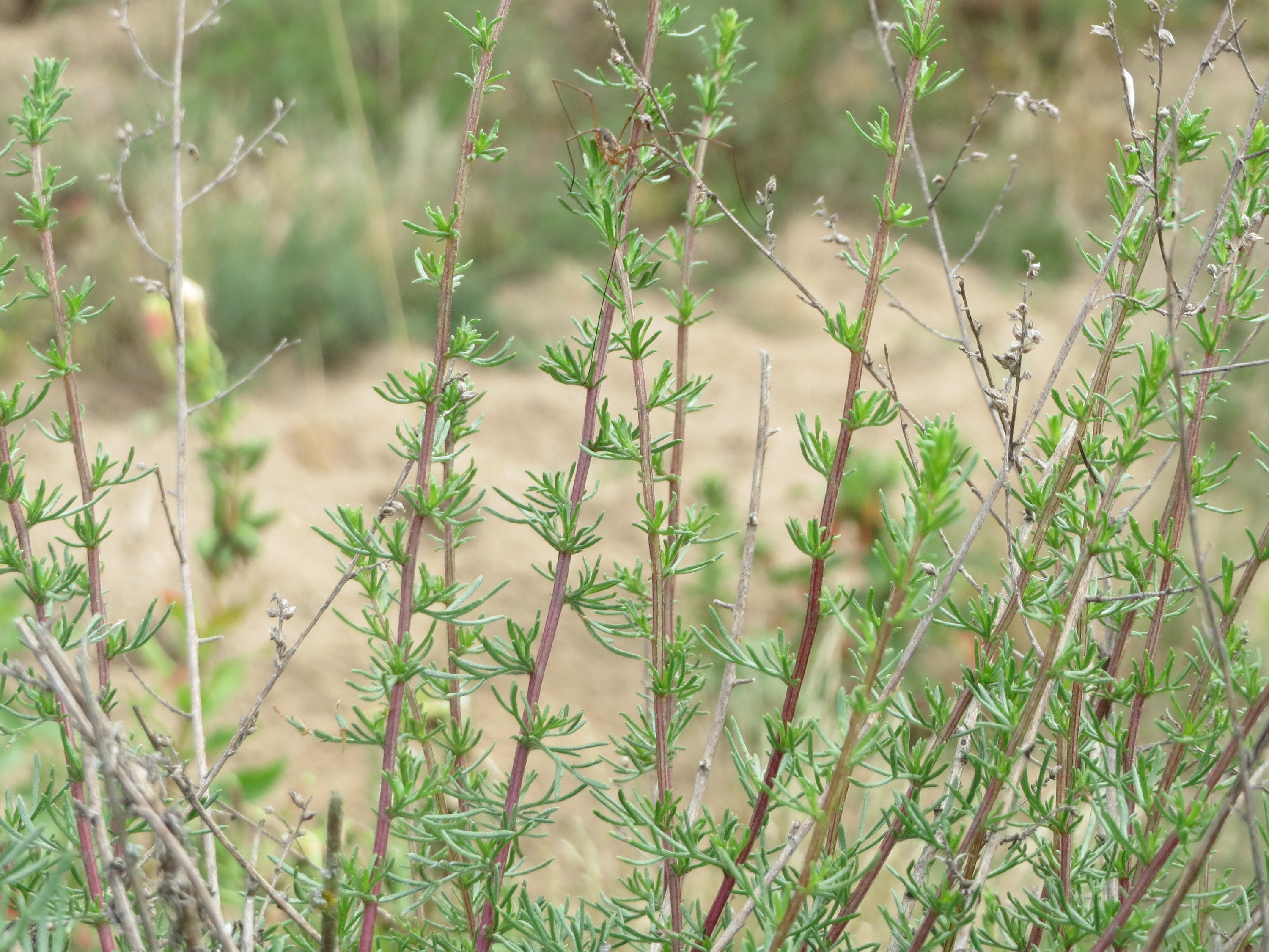 Feld-Beifuß (Artemisia campestris) im Naturschutzgebiet Gewann Frankreich-Wiesental